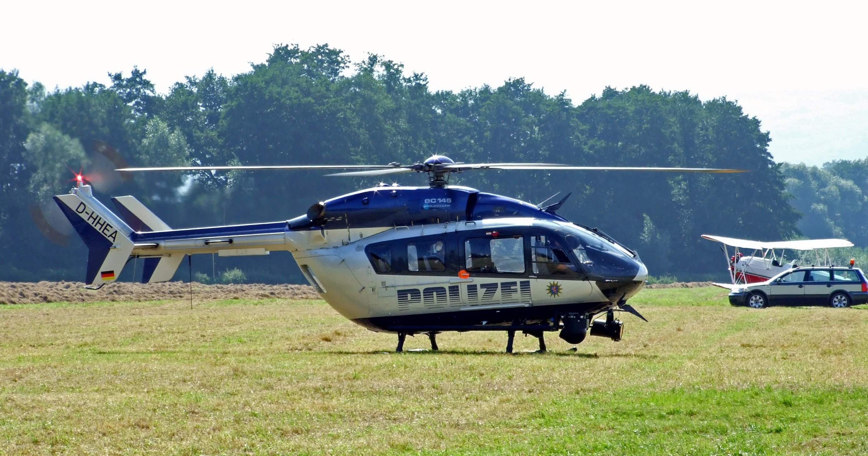 Polizeihelikopter Eurocopter EC 145, Taunus Flugfest 2007, auf dem Flugplatz Anspach im Taunus